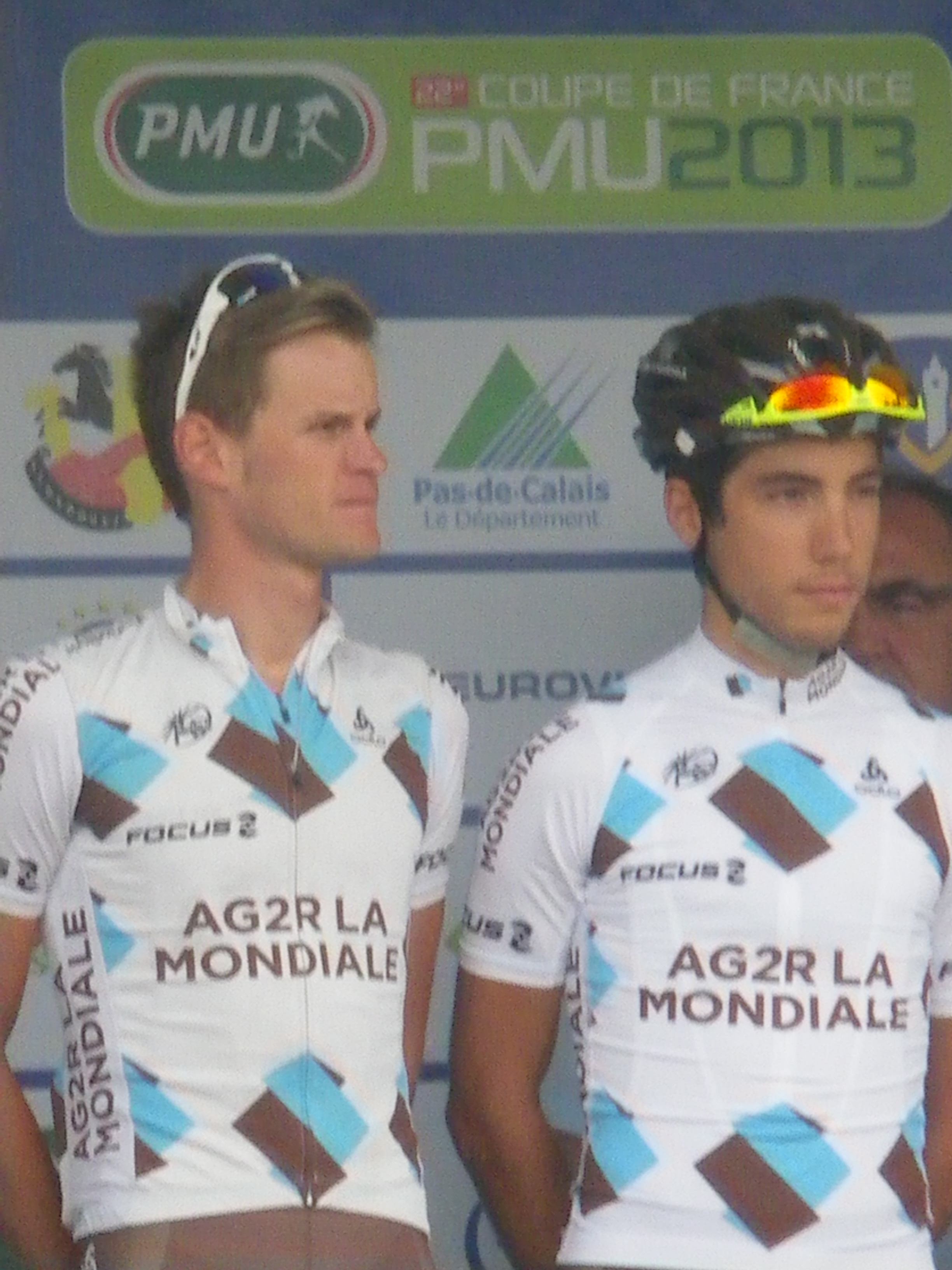 Maxime Bouet (à gauche) et son coéquipier Axel Domont (à droite) lors du Grand Prix d'Isbergues 2013.